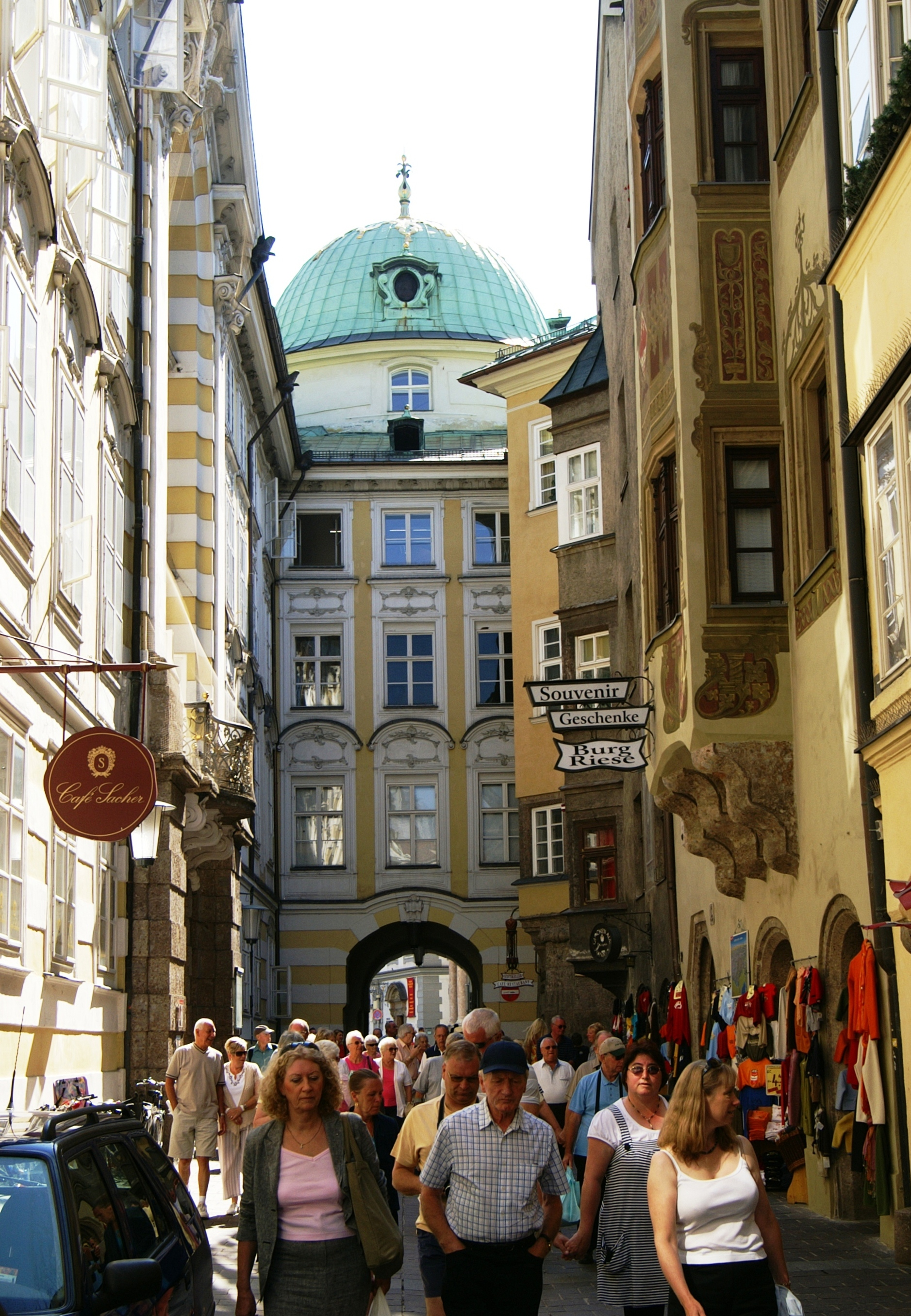 Die Hofburg (Innsbruck) war einst Sitz der Tiroler Landesfürsten. Blick von der Altstadt